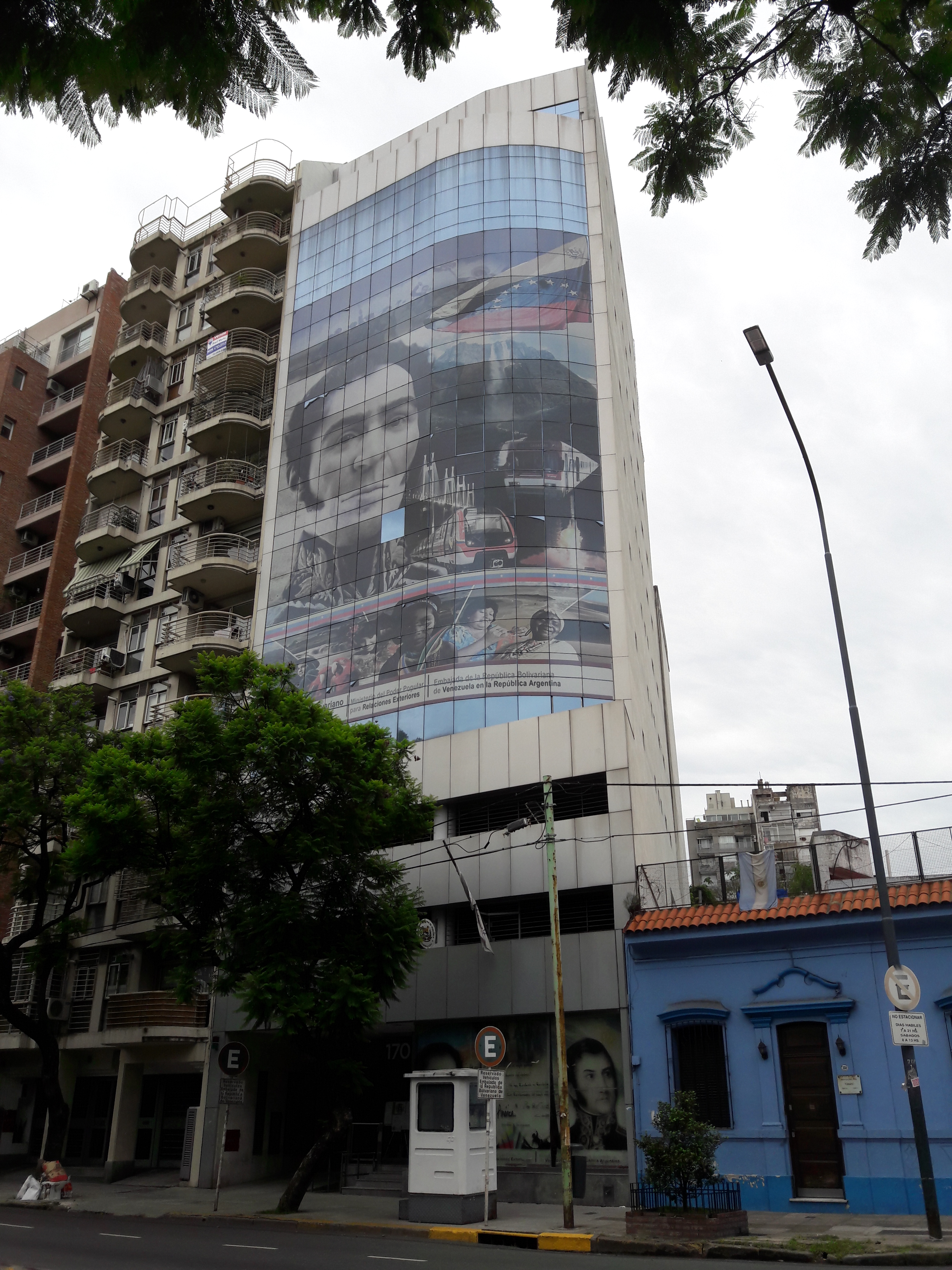 Embajada de la Rep. Bolivariana de Venezuela, Palermo, Buenos Aires, Argentina.